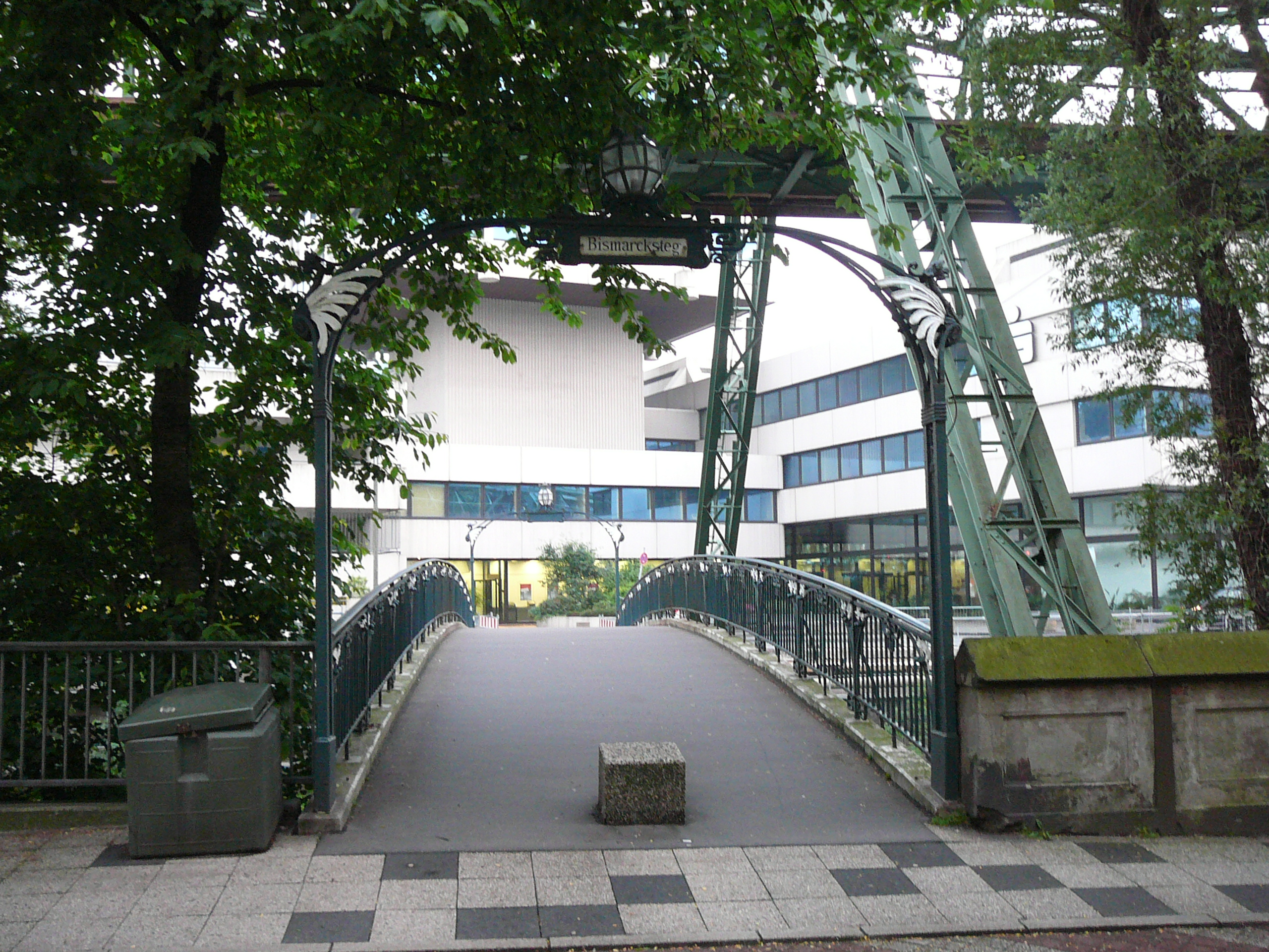 Bismarcksteg, Wuppertal